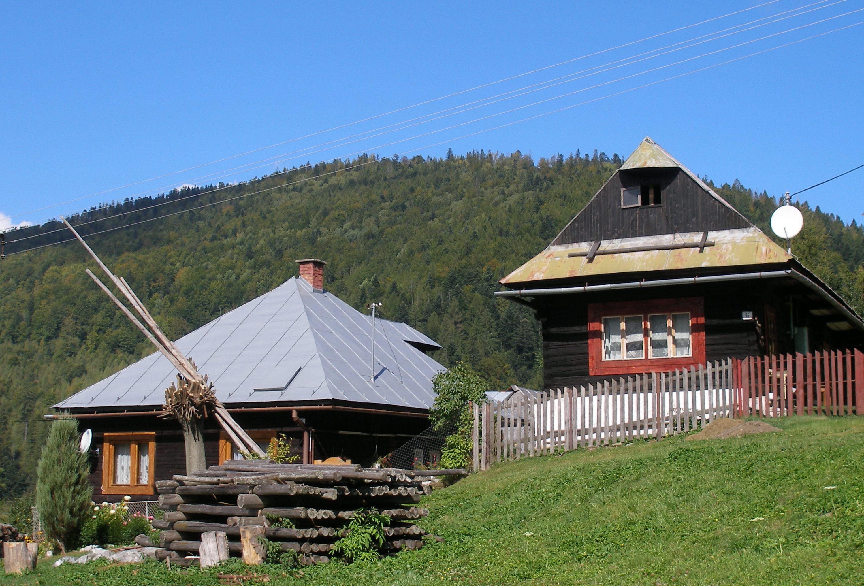 Spišská obec Henclová okres Gelnica.